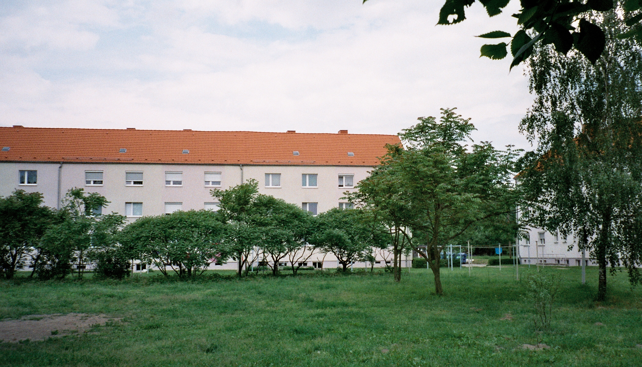 Wohnungsbaugenossenschaft (WBG) „Aufbau“ Strausberg eG: Häuser im Lindenweg in Hennickendorf